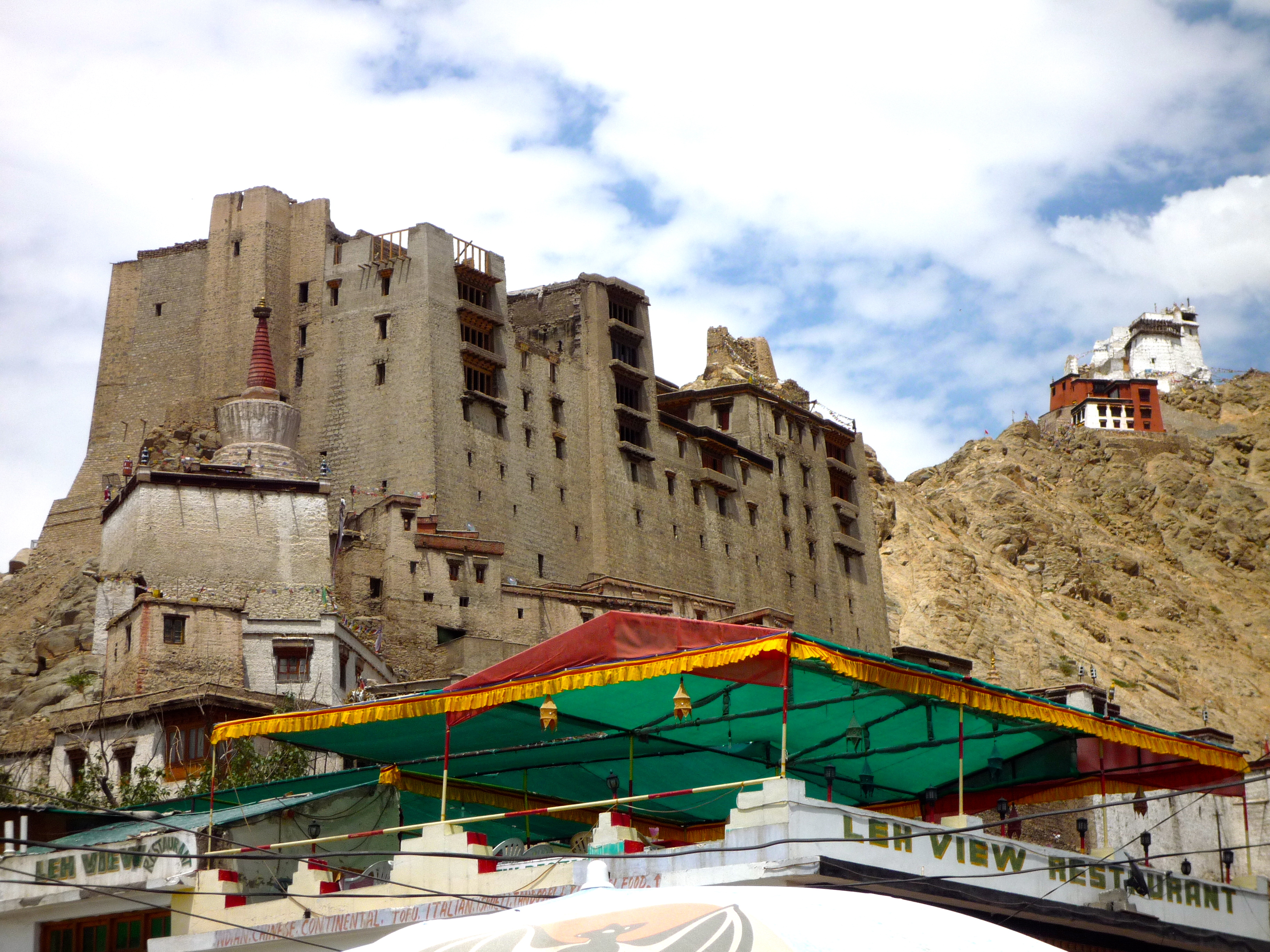 Le palais de Leh et le Namgyal Tsemo depuis le Bazar